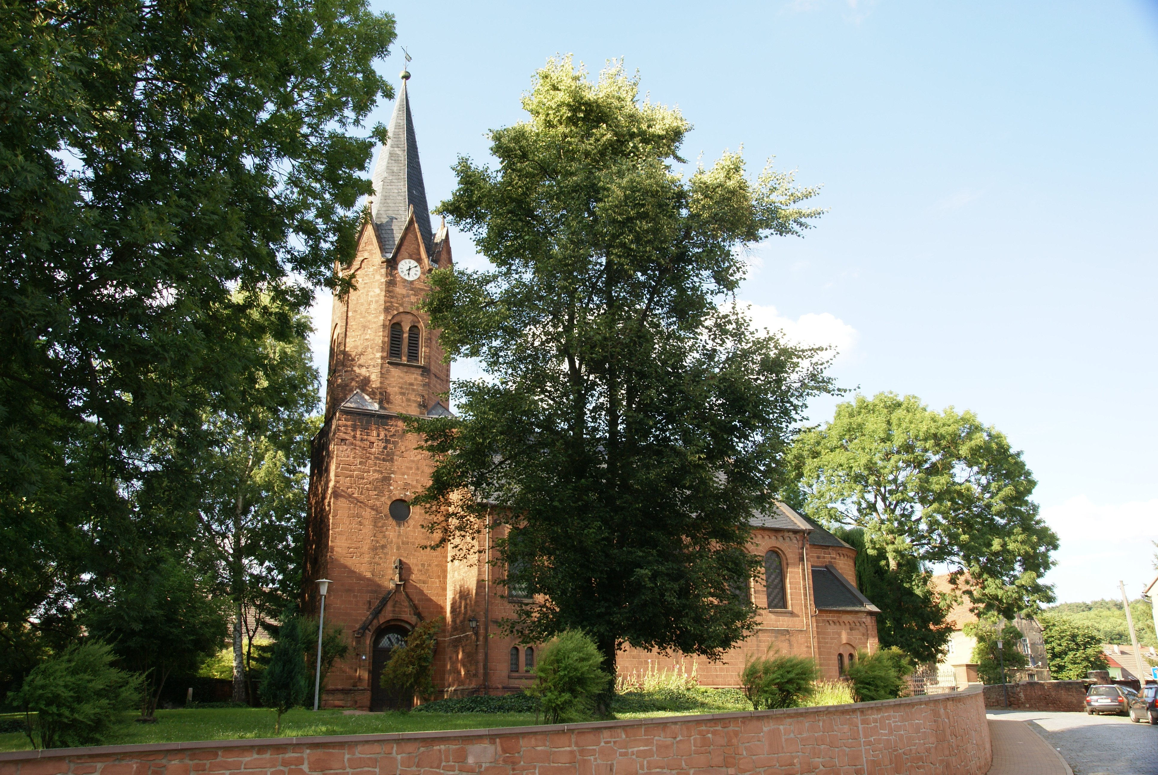 Die Dorfkirche vom Eislebener Ortsteil Rothenschirmbach